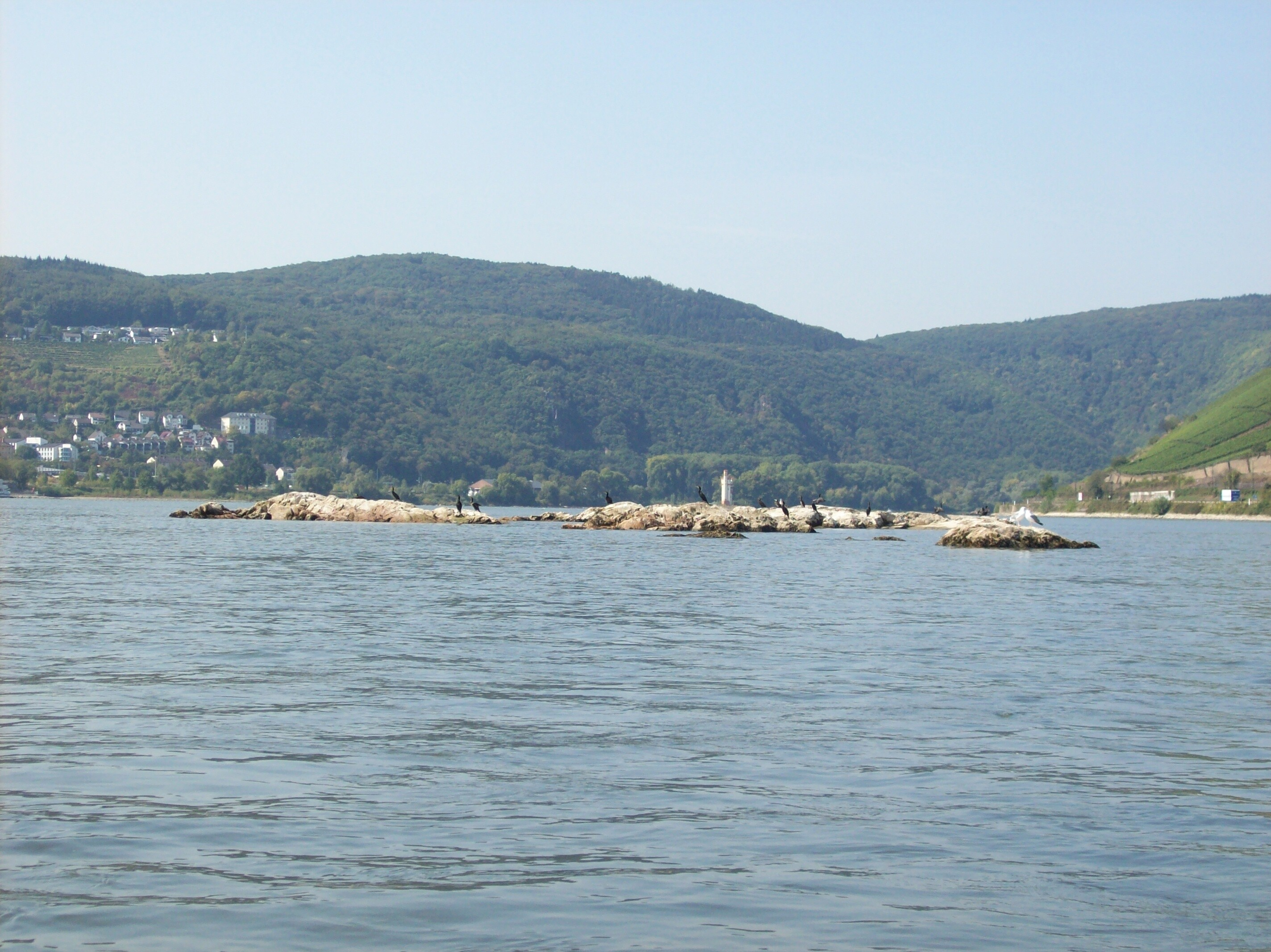 Krausaue bei Rüdesheim am Rhein